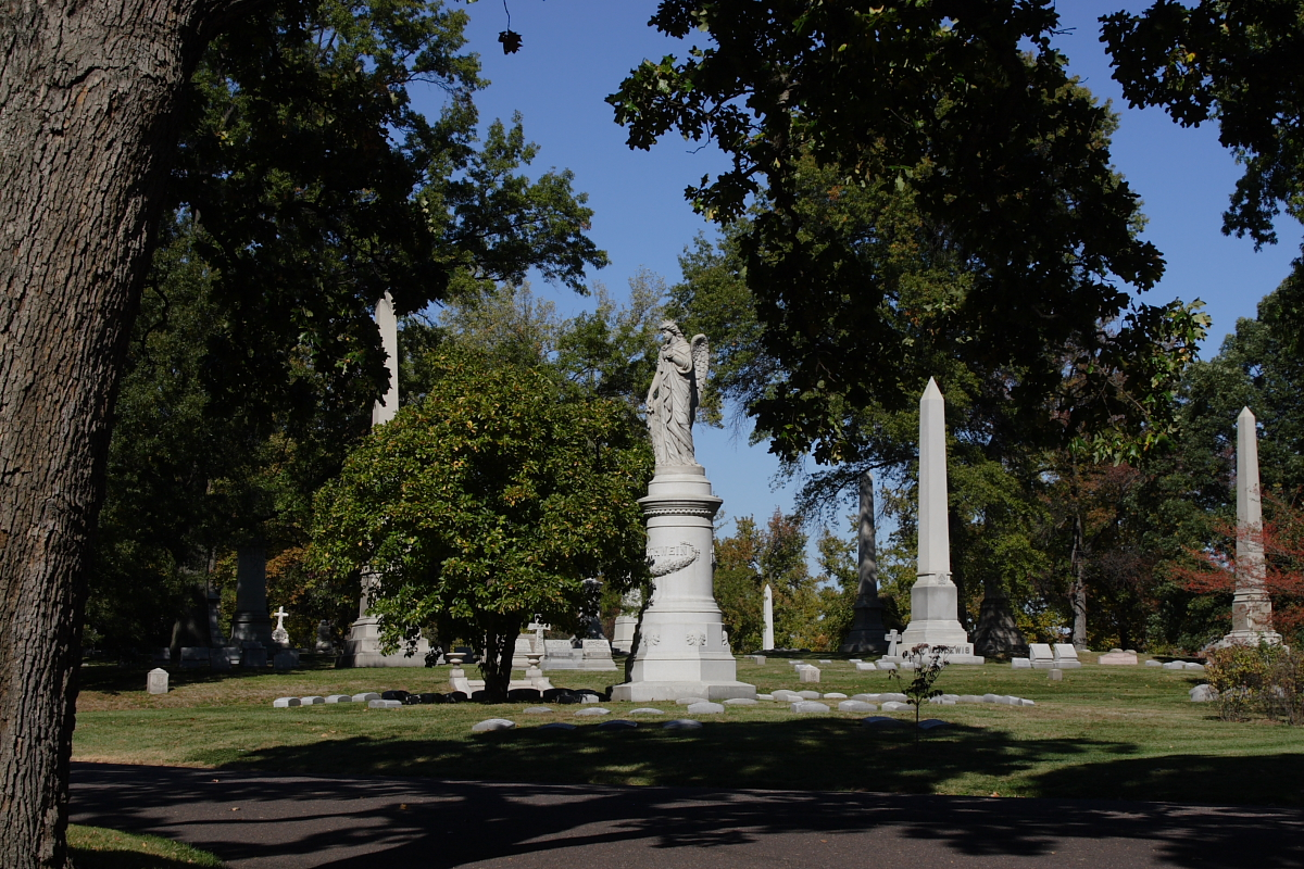 Bellefontaine Cemetery, St. Louis, Missouri